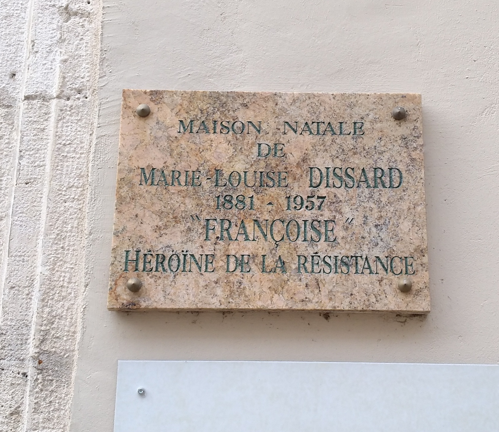 Plaque de la maison natale de Marie-Louise Dissard à Cahors (Lot, France).